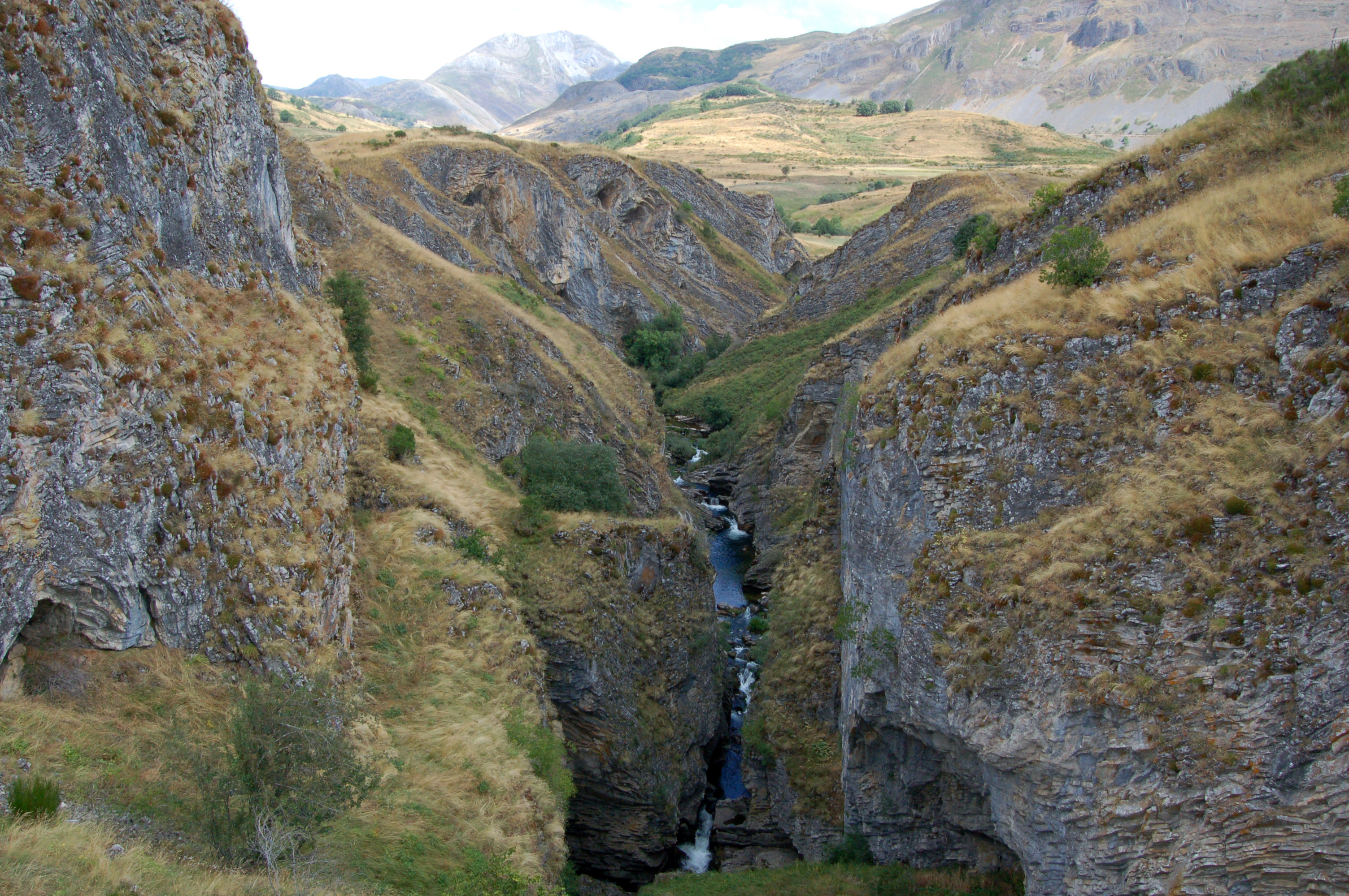 Vista del acantilado desde el Puente de los Palomas, comarca de Babia, León.